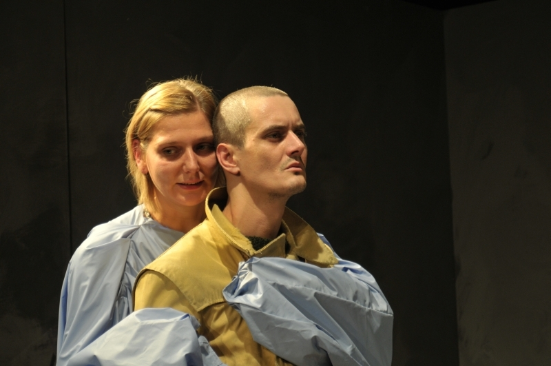 Katona József Színház. Rezes Judit és Keresztes Tamás.